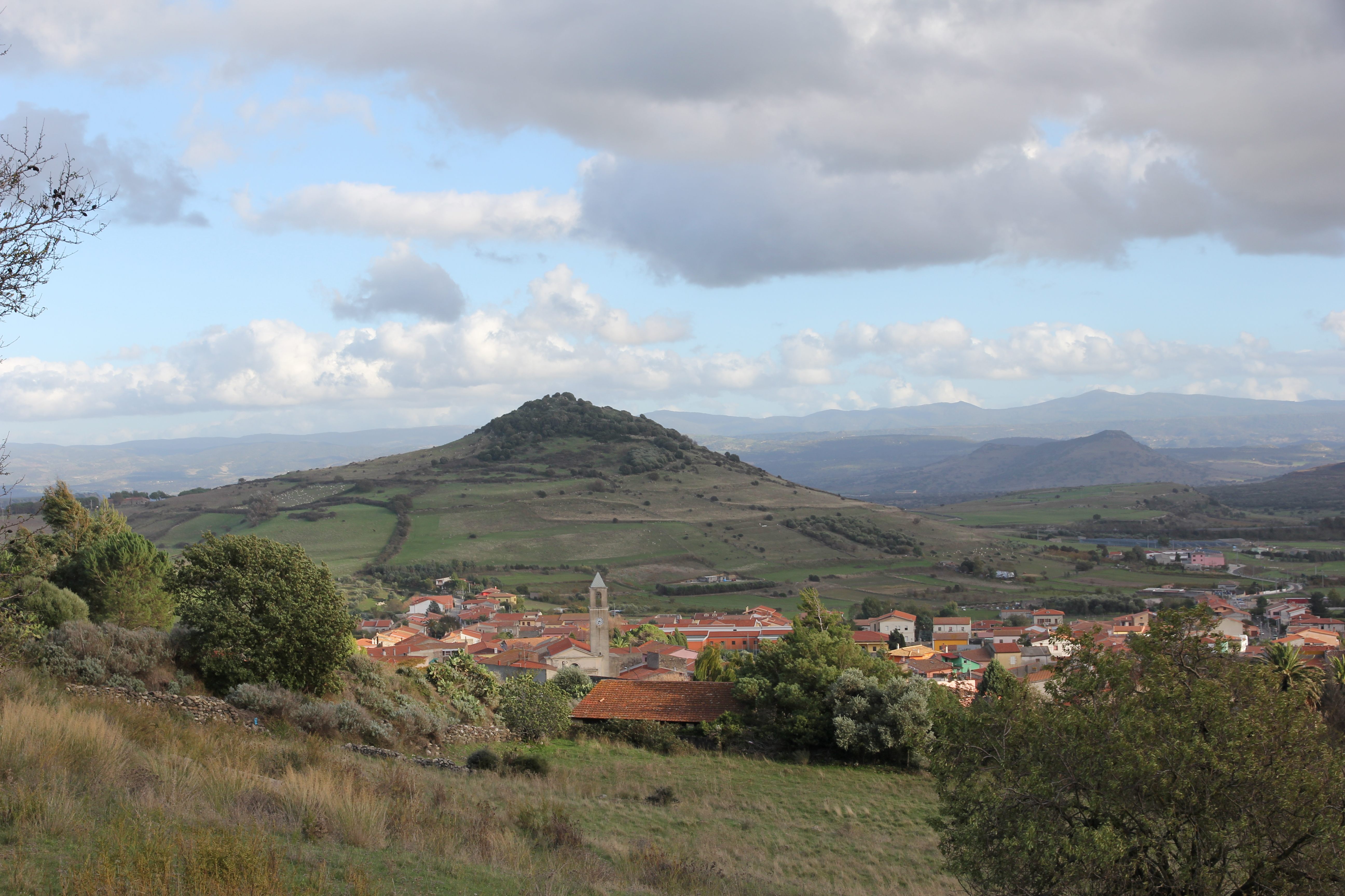 Bonnanaro - Panorama